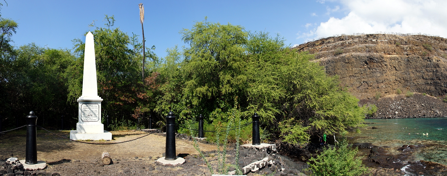 Иллюcтрация для викиучебника Гавайеведение